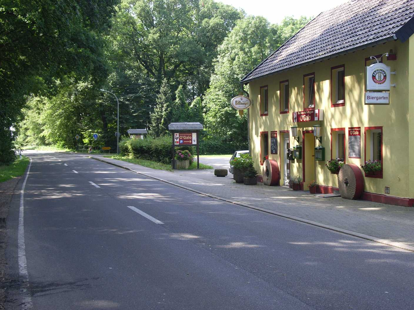 Gaststätte und Landstraße im Erkelenzer Wahnenbusch